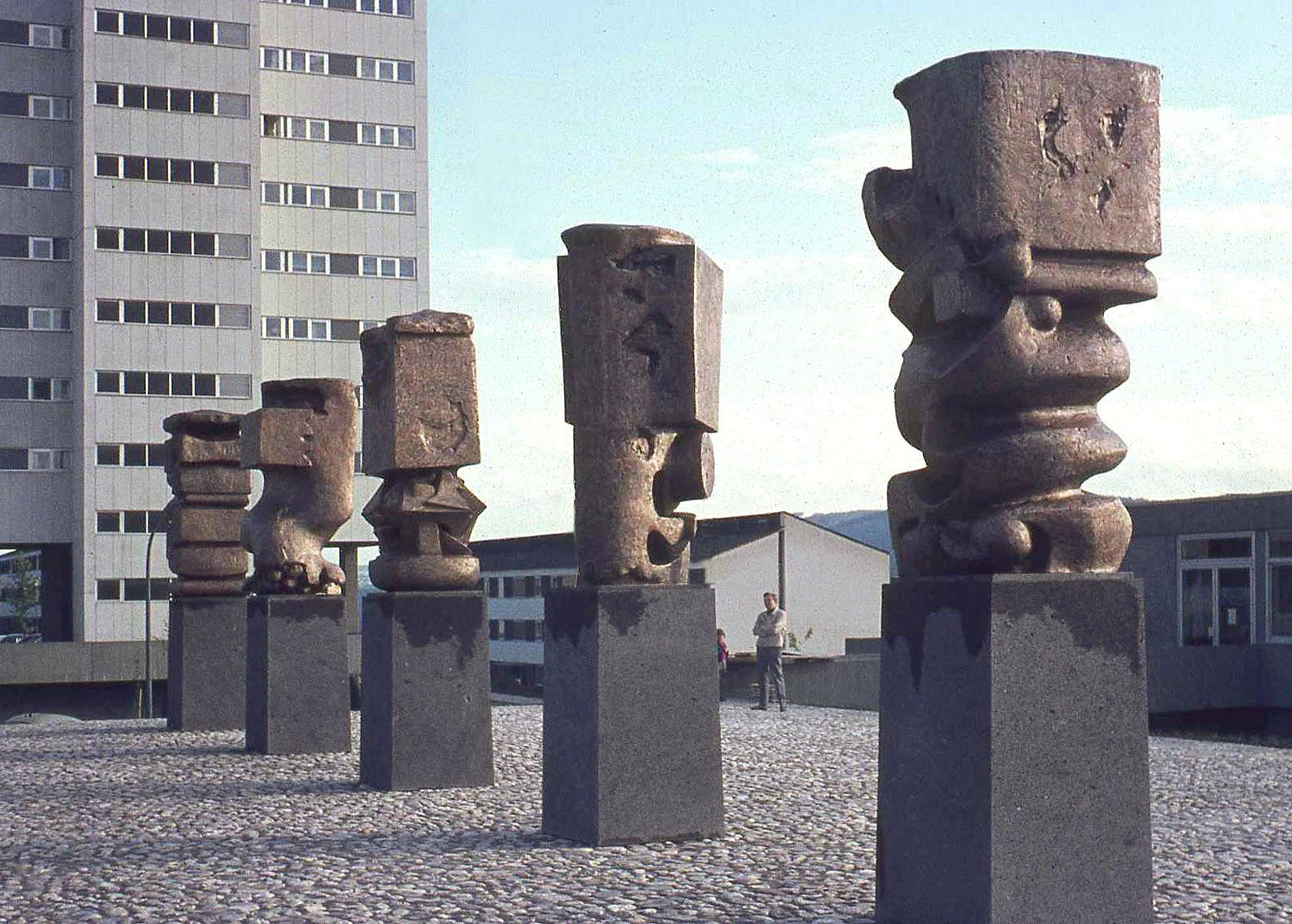 Günther Oellers, 5 Stelen, Platzgestaltung Neubausiedlung in Koblenz - Horchheimer Höhe, 1967, Bronze